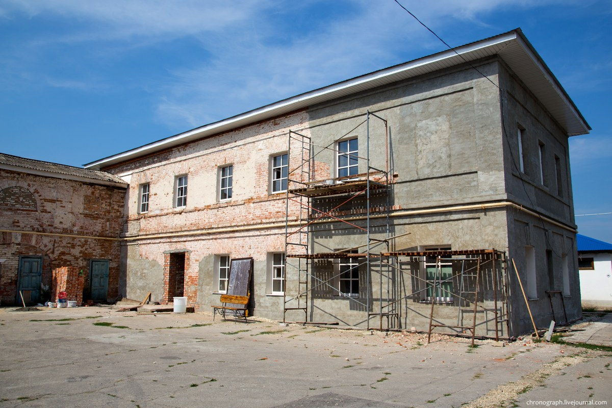 Трапезная реставрируется. Вознесенский Сызранский мужской монастырь